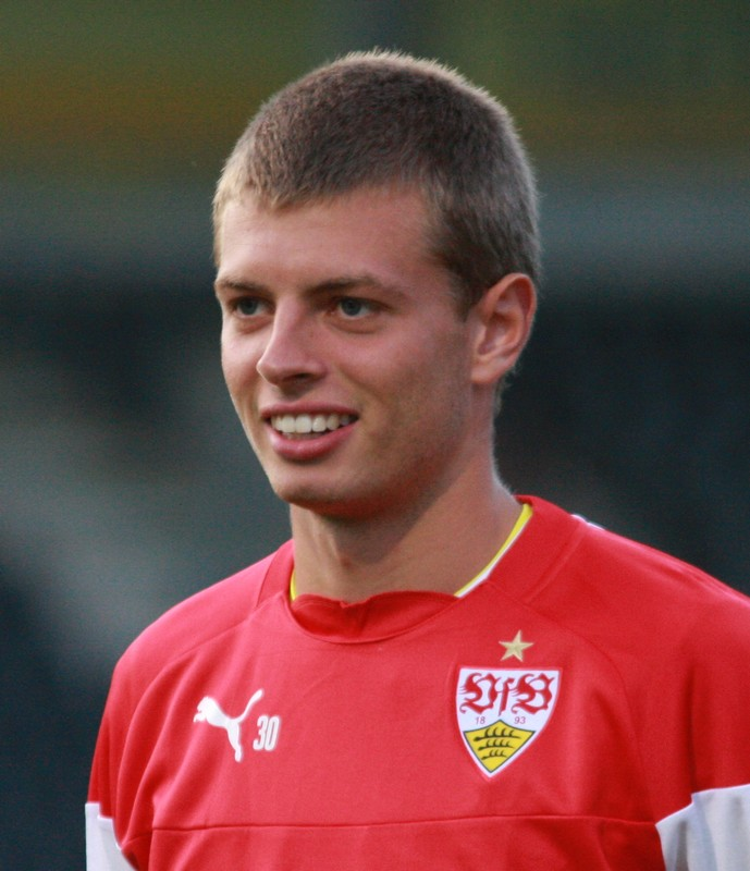 Benjamin Uphoff beim Aufwärmen während des Spiel gegen Regensburg. Aufgenommen von